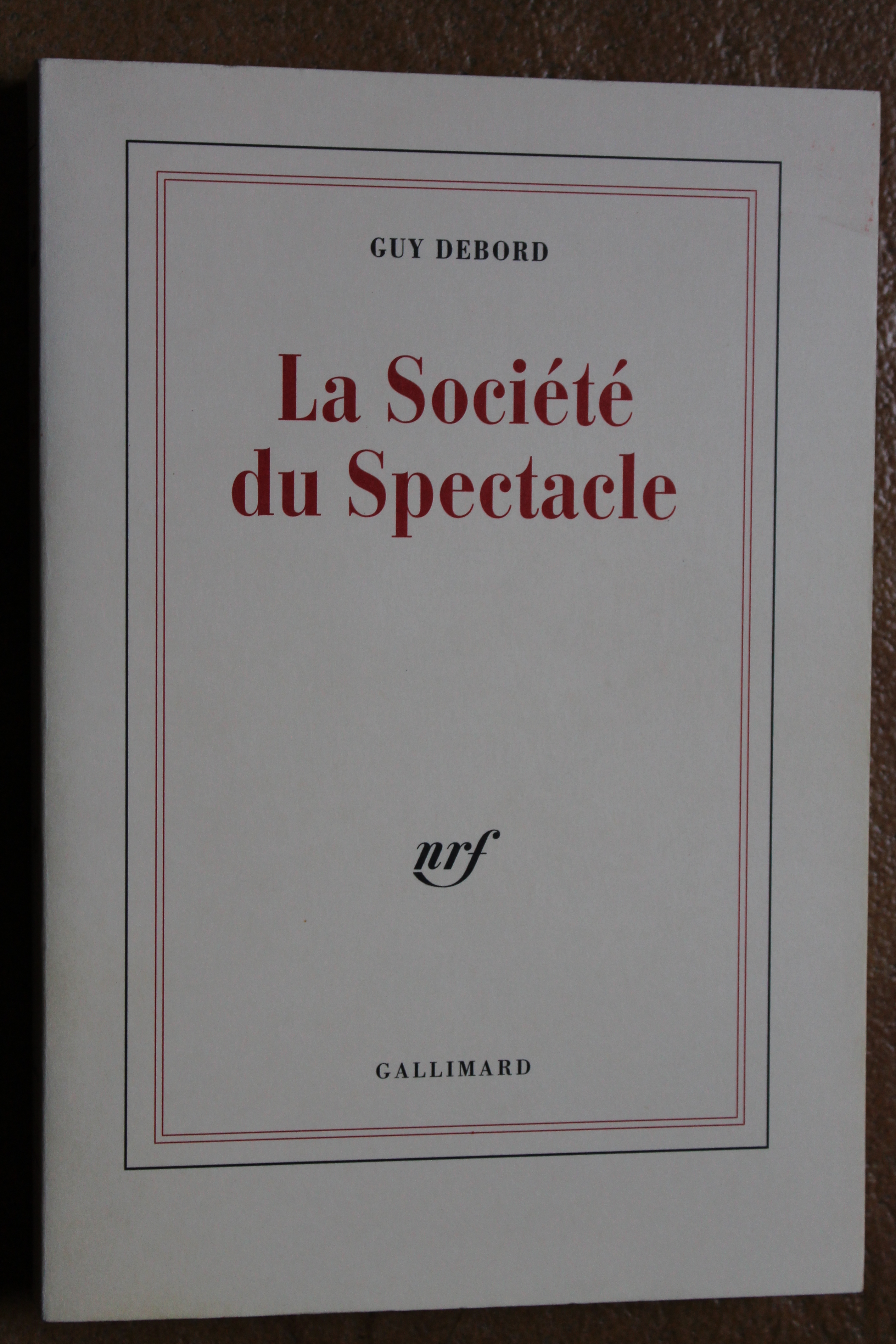 Couverture de La Société du Spectacle de Guy Debord (Gallimard)